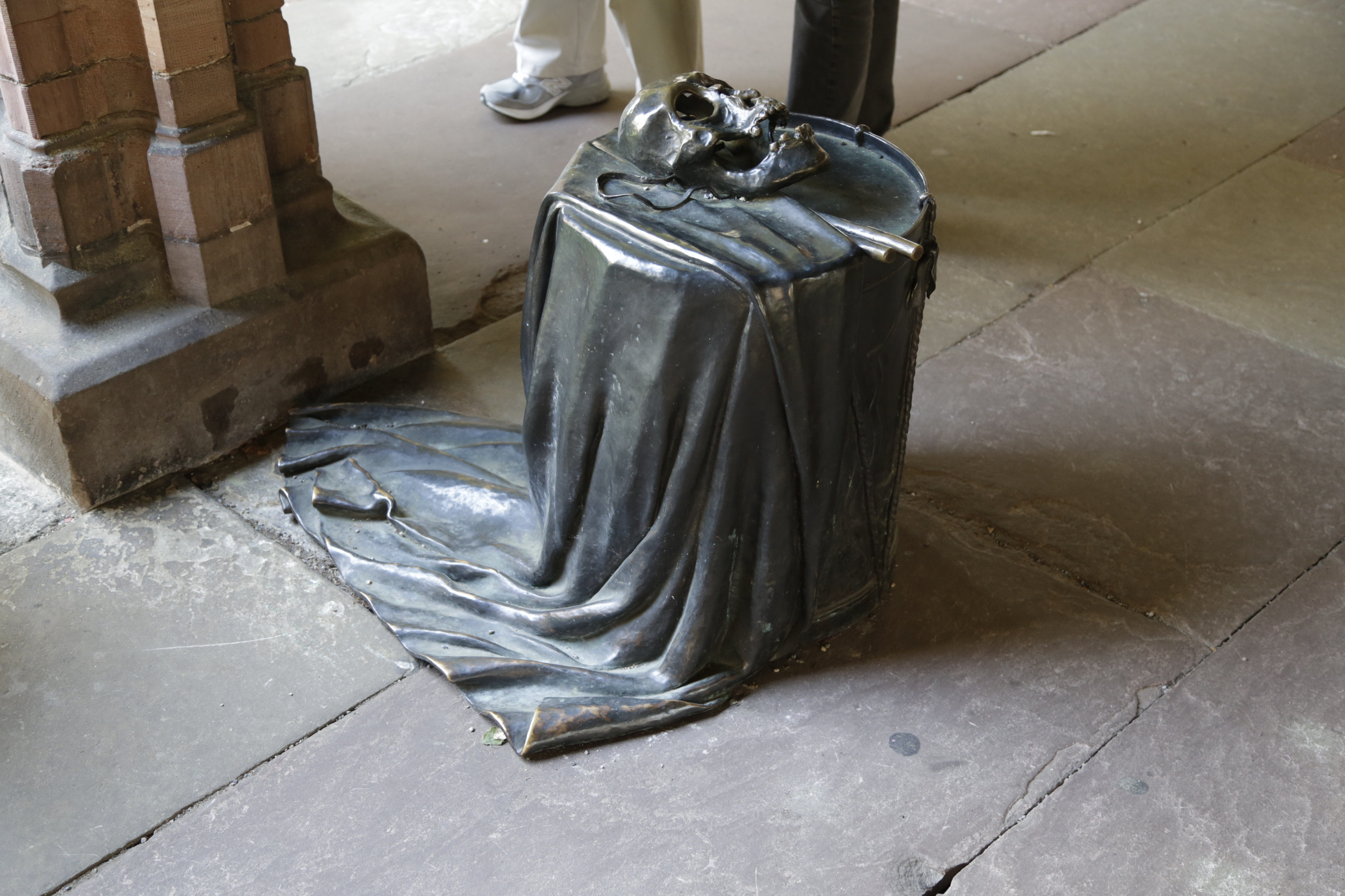 Die Markttische im Kreuzgang des Basler Müsters, sind eine Arbeit von Bettina Eichin.